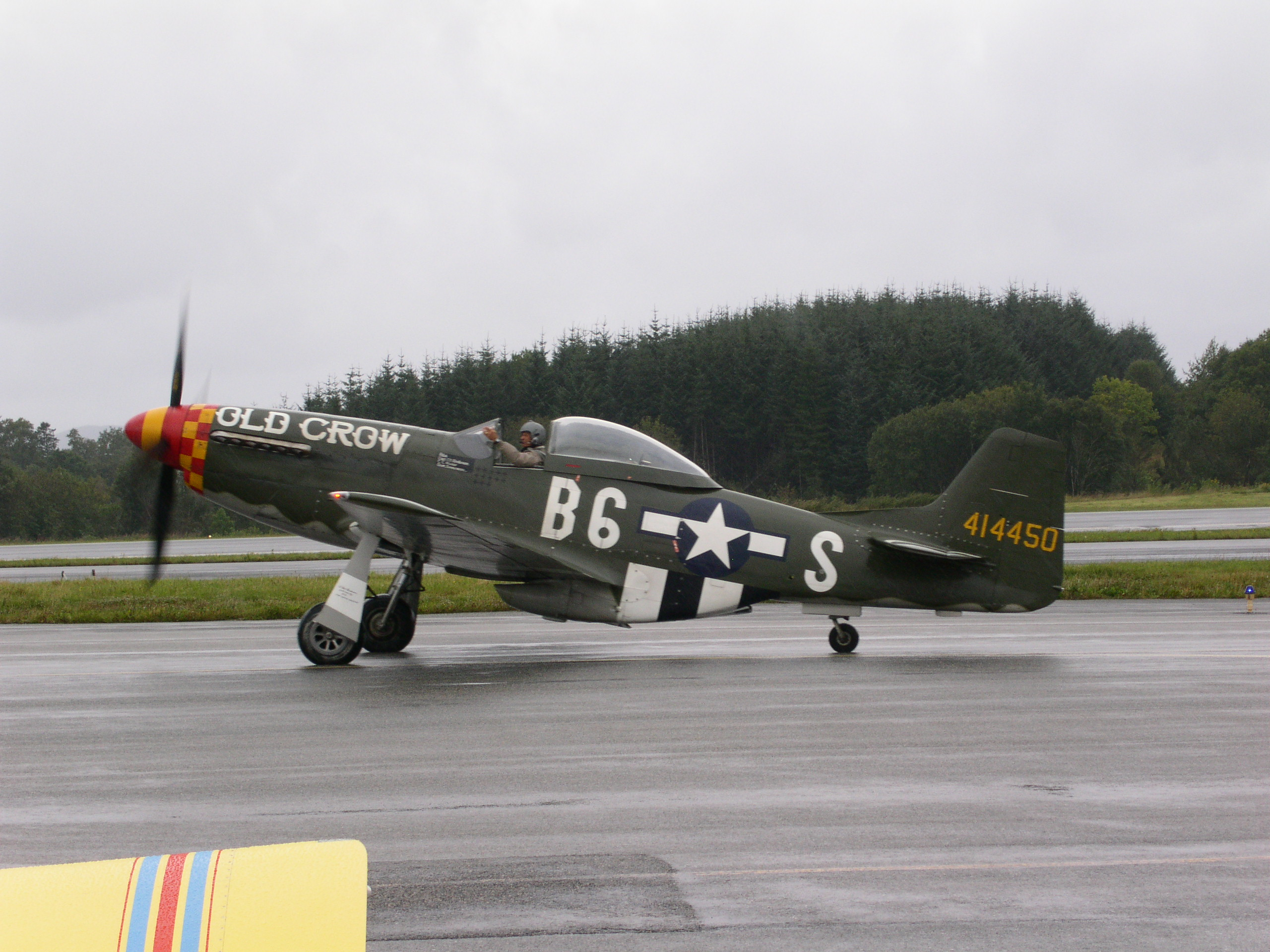 Bill Anders at Bergen Air Show